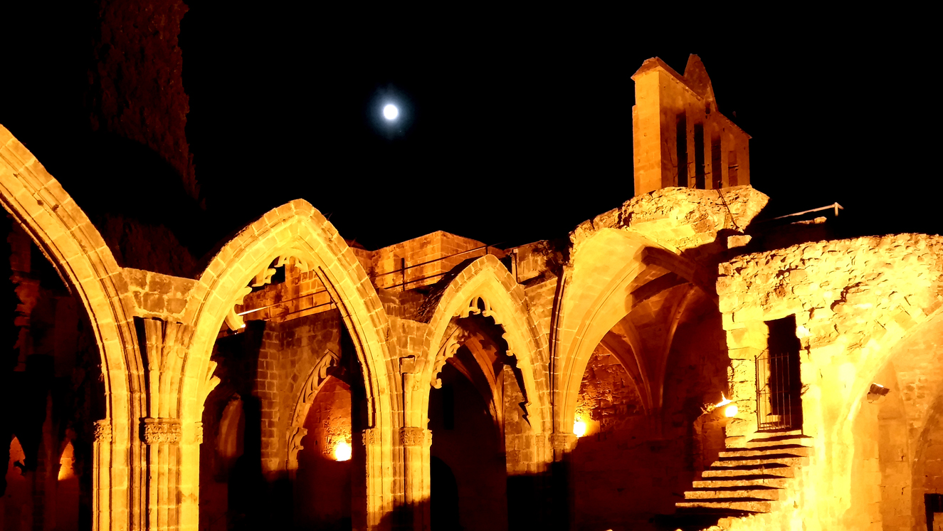 Die Klosteranlage von Bellapais wurde im 13. Jahrhundert gegründet und im 14./15. Jh. weiter ausgebaut. Sie liegt auf einem Geländevorsprung am Nordhang des Pentadaktylos/Beşparmak-Gebirges bei Kyrenia/Girne im Norden Zyperns